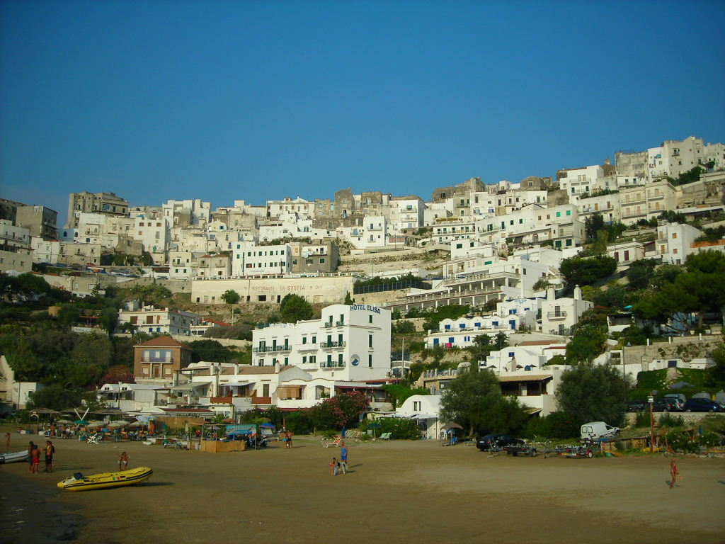 Peschici - Vista della città dalla spiaggia